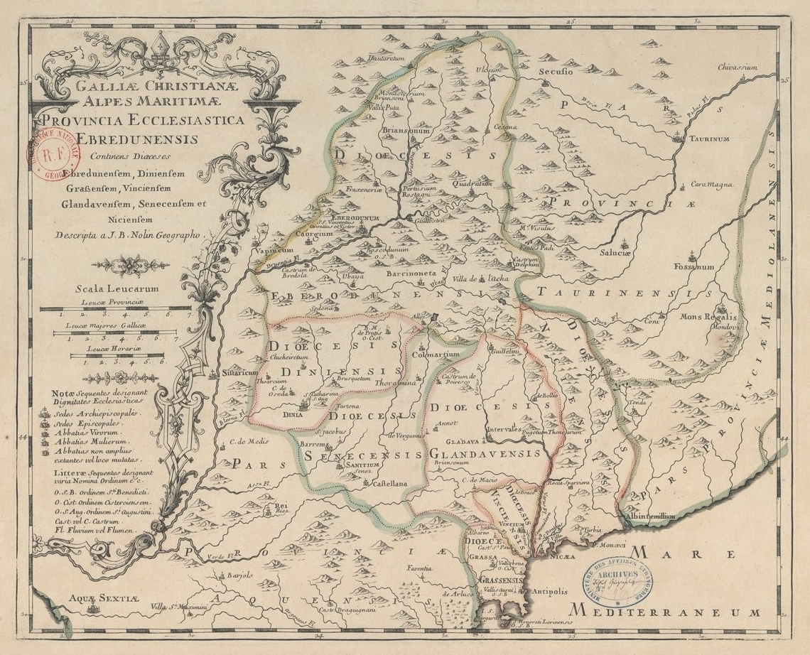 Carte de l'ancienne province ecclésiastique d'Embrun, insérée dans la Gallia Christiana (1715/1759).